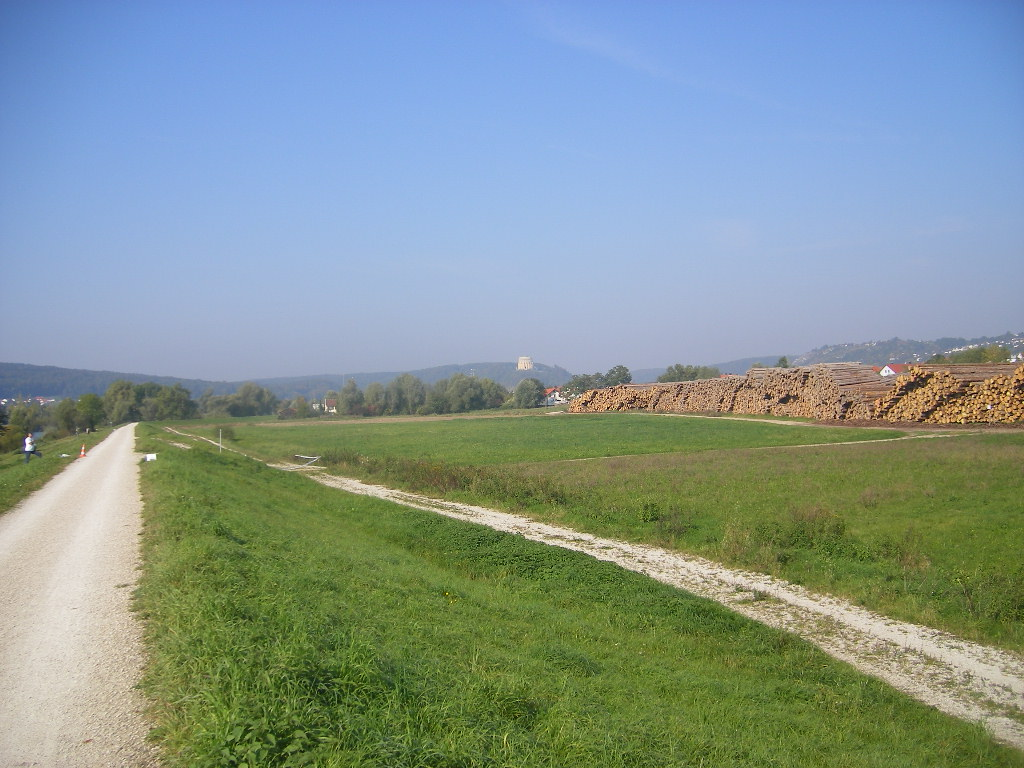 Donauradweg between Kelheim and Kelheimwinzer